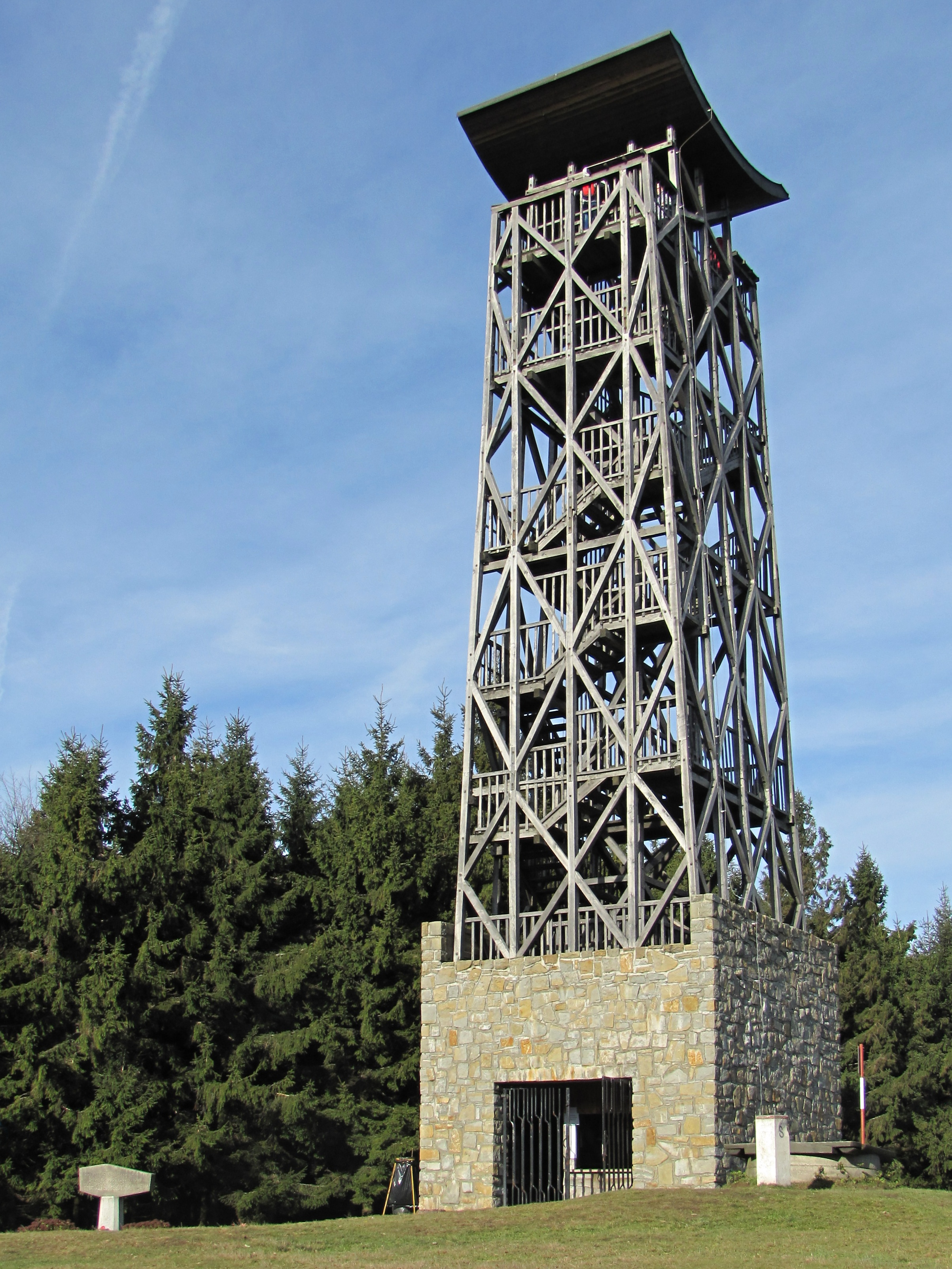 Rozhledna na Velkém Lopeníku z roku 2005